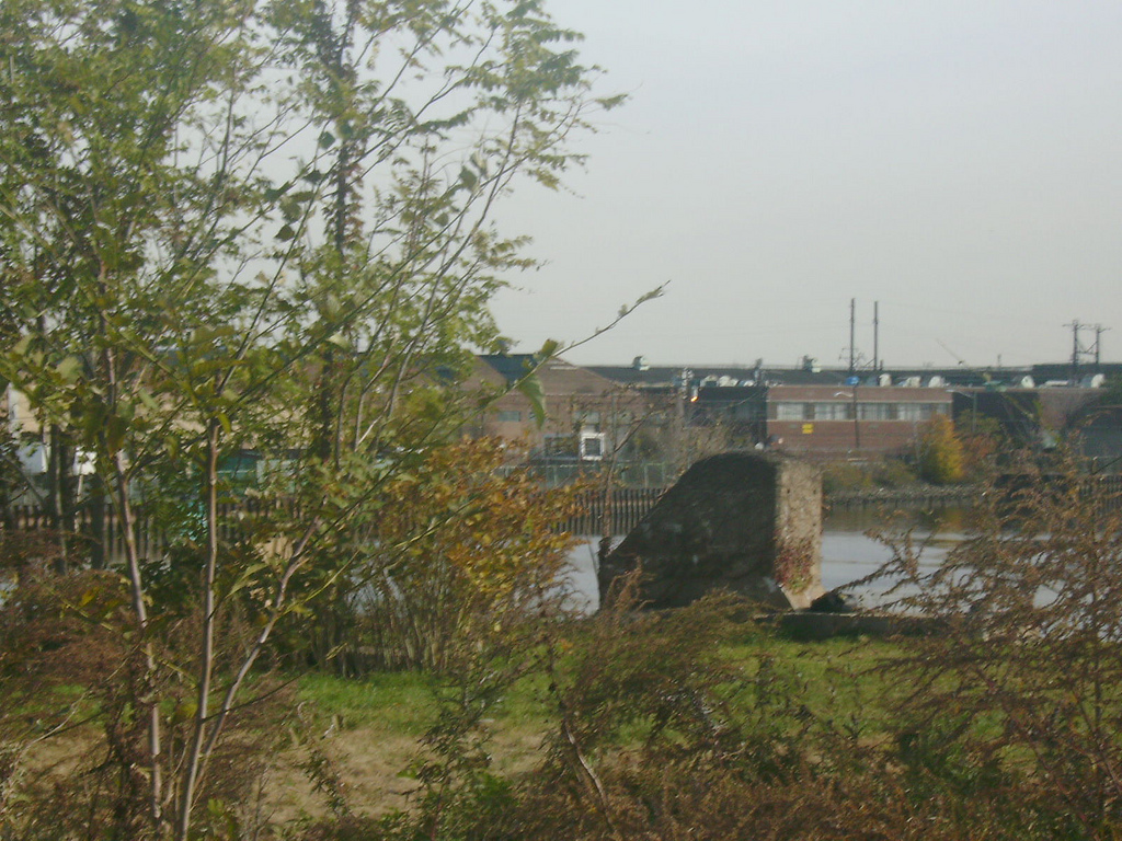 Vivitar